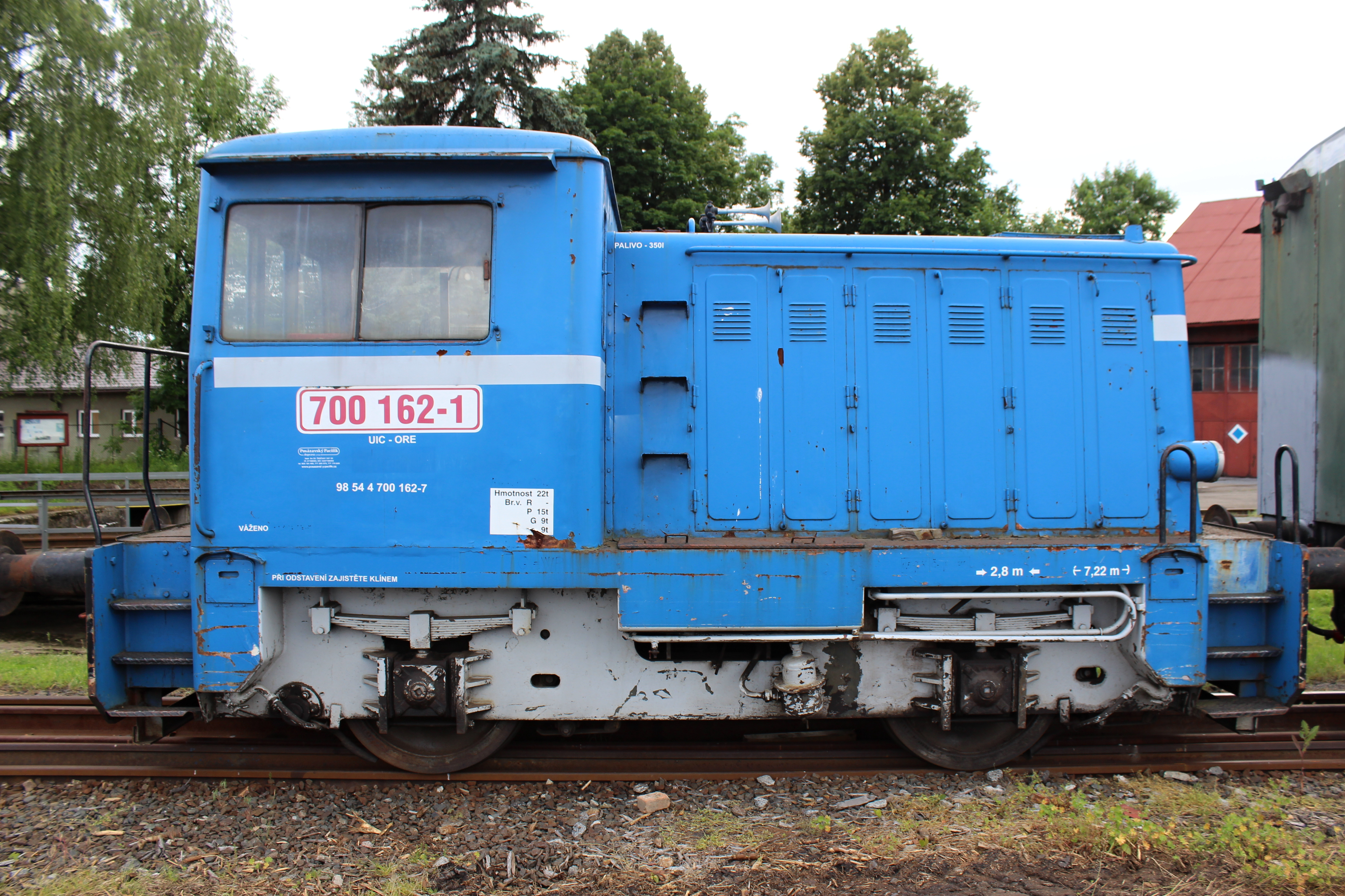 Lokomotiva T 700 700162-1 modrá Nádraží Benešov u točny - 5. 6. 2014 Sbírka historických strojů a historických železničních vozů Posázavský Pacifik, o. s. , které pečuje o řadu technických unikátů. Stroje a vozy jsou též užívány při nostalgických jízdách historických vlaků. Více na: Výrobce: ČKD Praha 1957-62 Detailní dokumentace stroje Lokomotiva řady 700 (původně do roku 1988 řada T 211.0) je dvounápravová motorová lokomotiva s mechanickým přenosem výkonu. Byla určena pro posun na nádražích a v depech a na vlečkách. Více